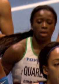 WK2B0110 800m vijfkamp